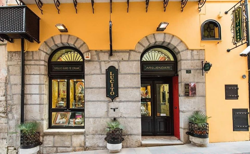 Argjendari, bottega Lucito di oreficeria in via P. M. Costantini a Piana degli Albanesi, con insegne in lingua albanese Stoli e gurë të çmuar (Gioielli e pietre preziose).